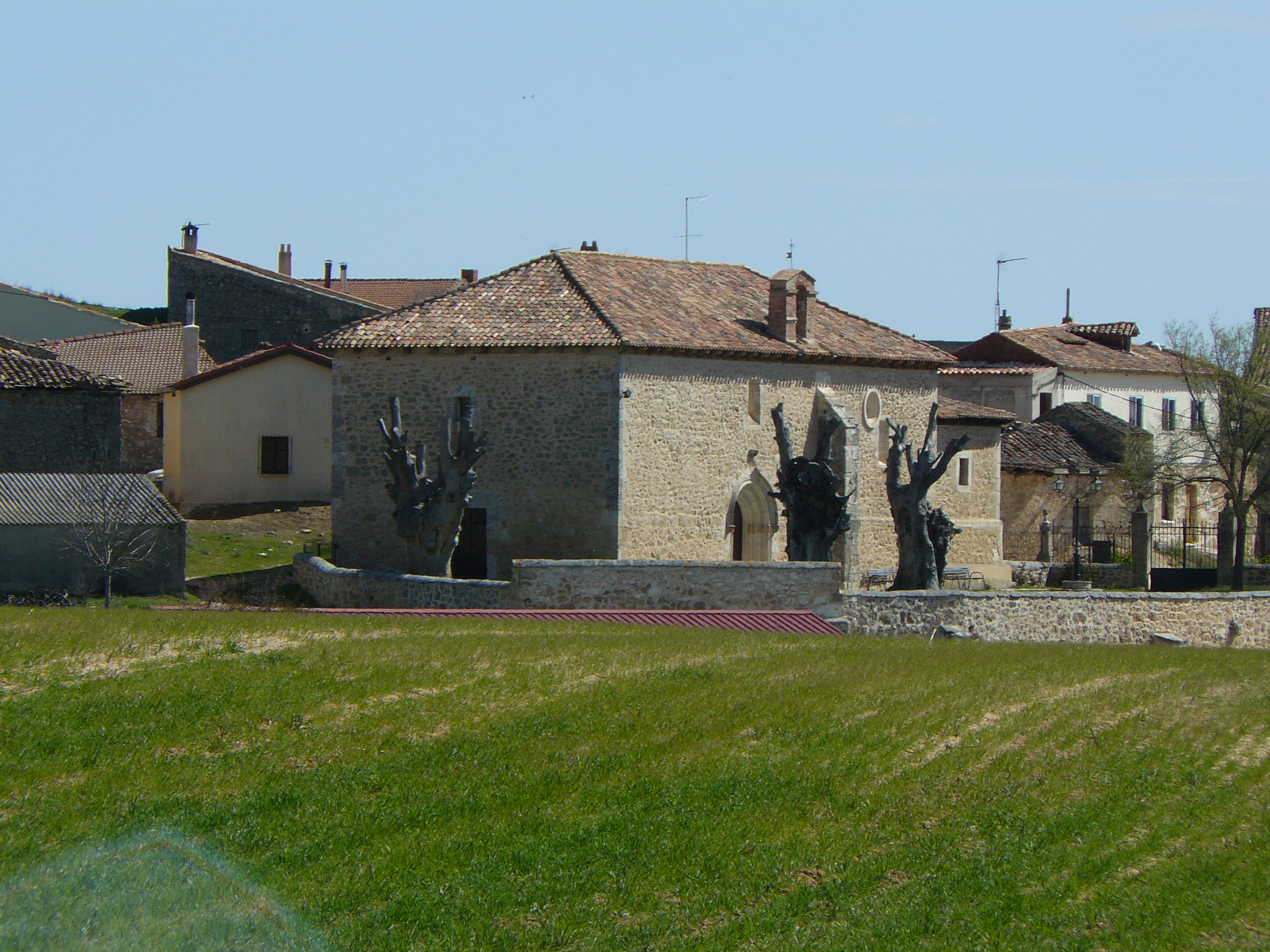 Quintana del Pidio, Burgos.